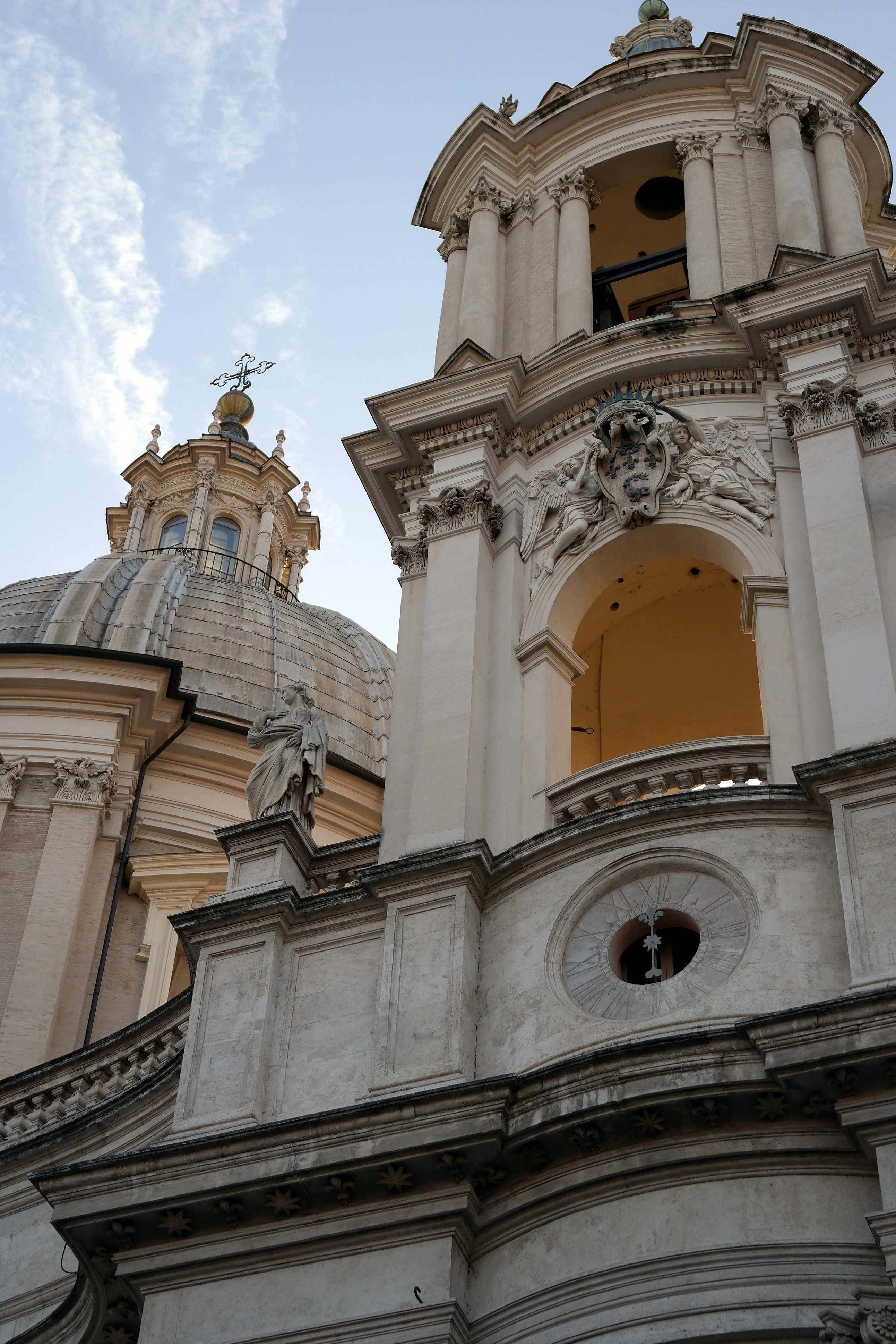 Dettaglio di uno dei due campanili e della lanterna della Chiesa di Sant'Agnese in Agone, in Piazza Navona, a Roma.